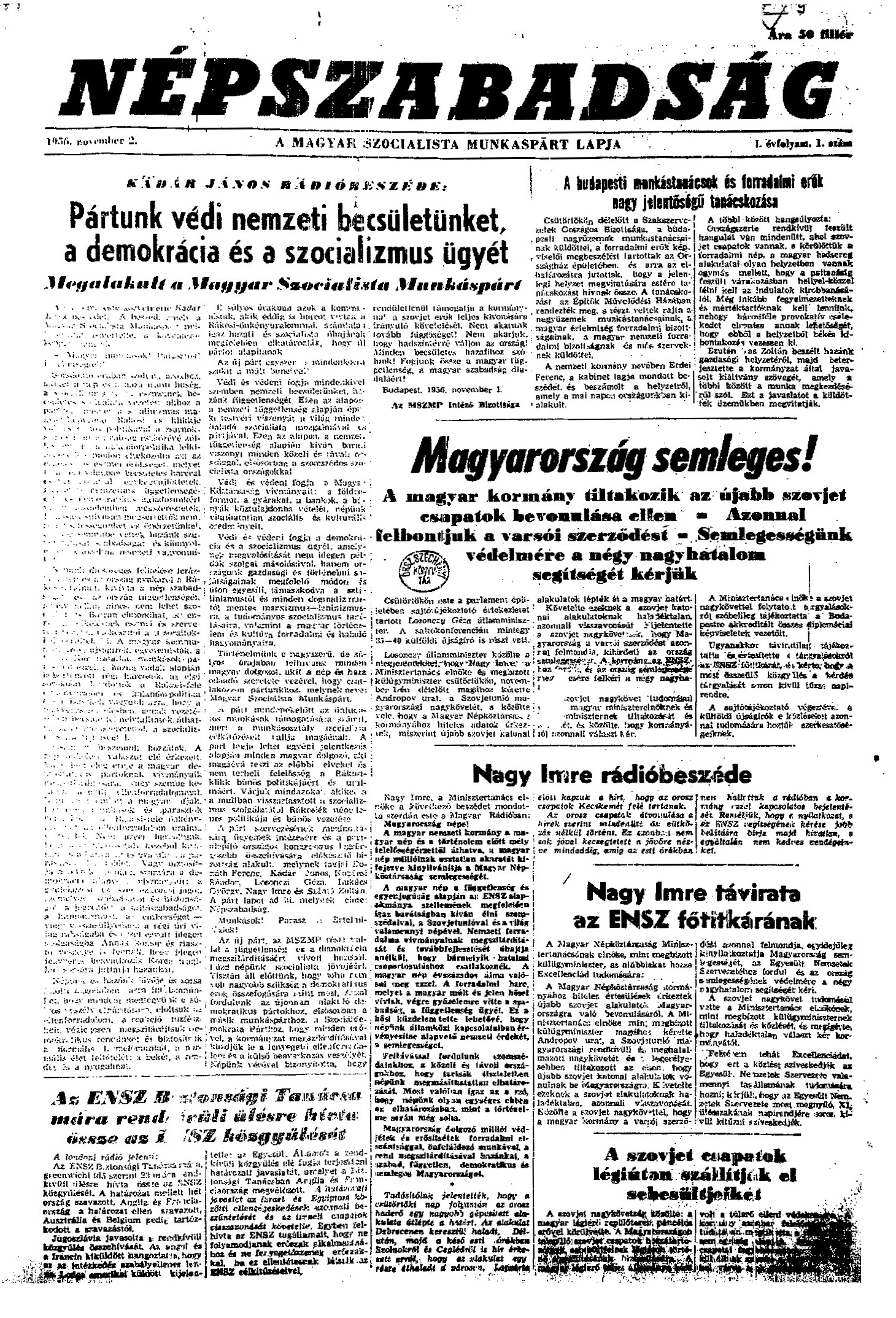 A Népszabadság 1956. november 2-án kiadott első száma. (1958. február 1-jétől átvette a Szabad Nép évfolyamszámozását, ekkor az évfolyama 16.-ra változott).